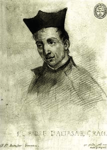 Retrato de Baltasar Gracián